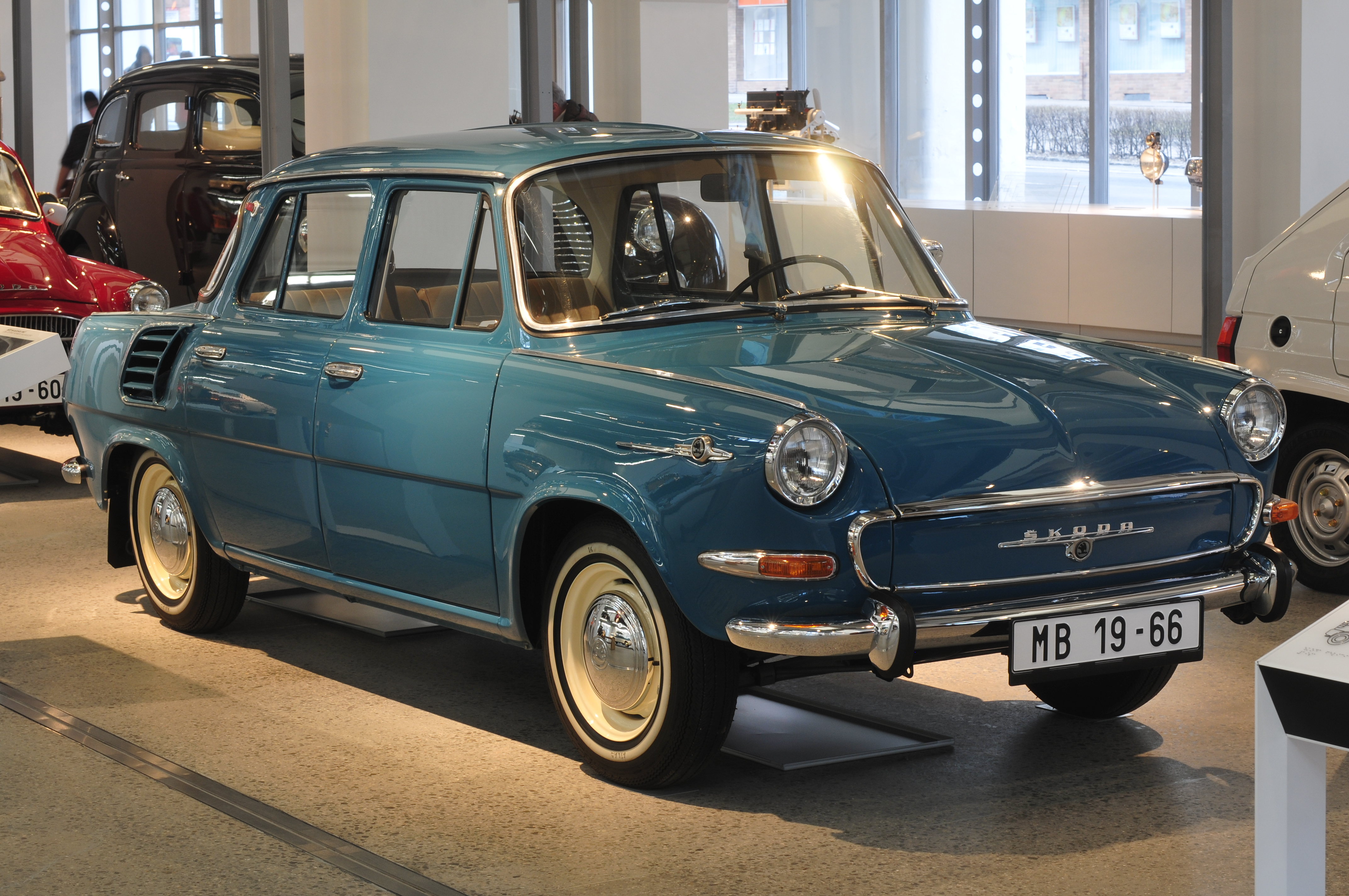 Fototermin Škoda Museum Mladá Boleslav 2013 Fototermin Škoda Muzeum 5. April 2013 in Mladá Boleslav This work is free and may be used by anyone for any purpose. If you wish to use this content, you do not need to request permission as long as you follow any licensing requirements mentioned on this page.